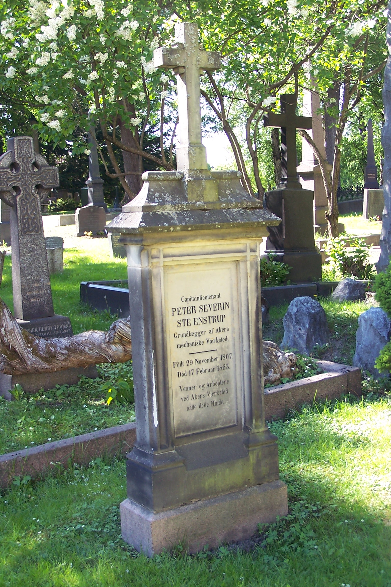 Tomb of Peter Severin Steenstrup at Vår Frelsers gravlund, Oslo